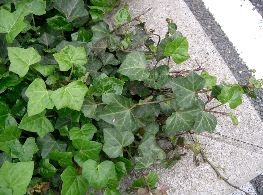 Hedera helix